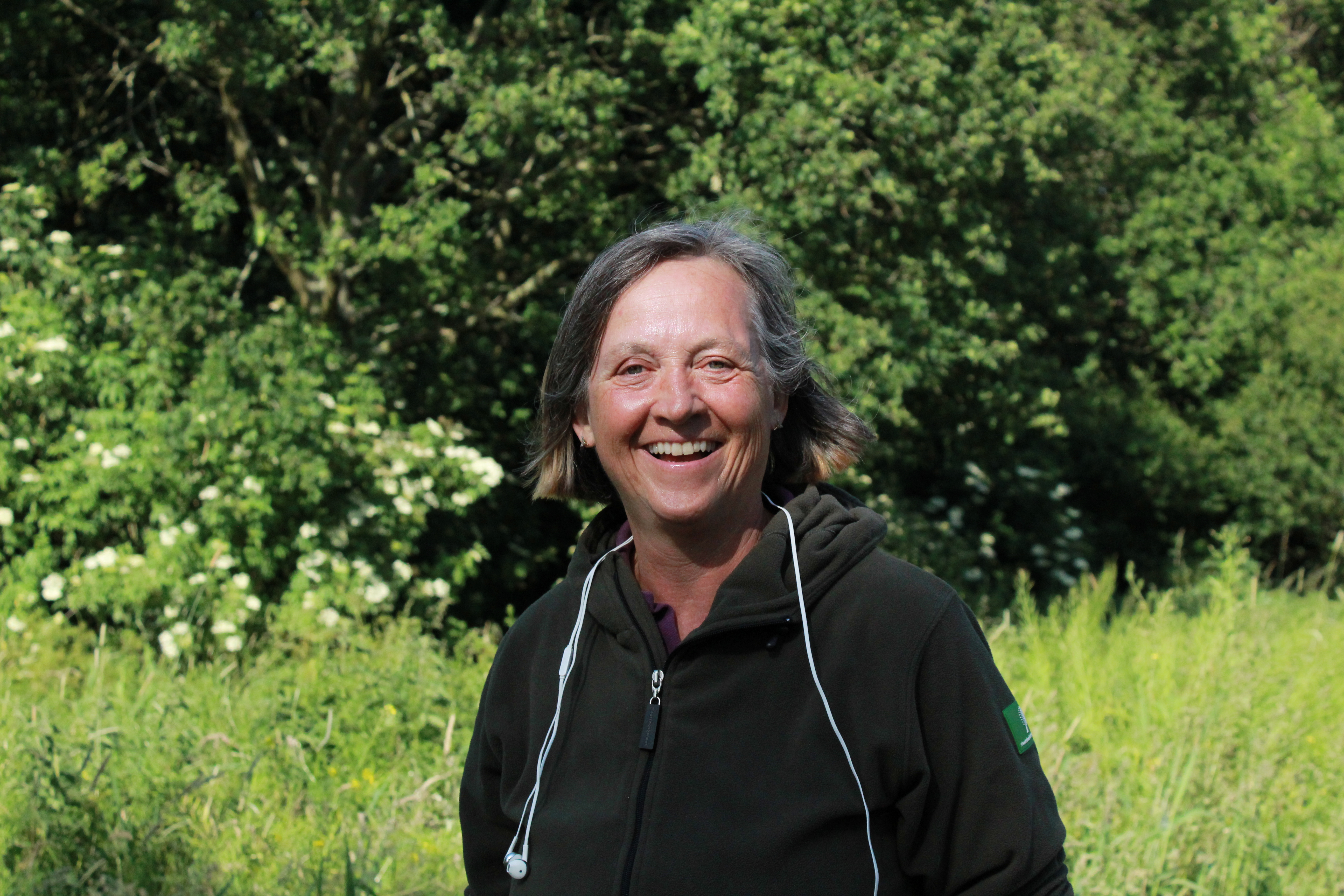 Inga Tessel